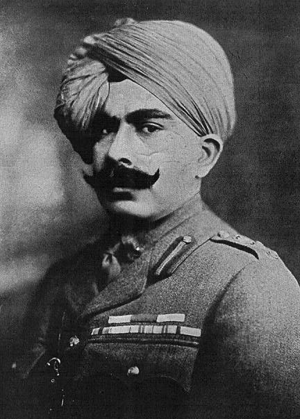 Ganga Singhji Bahadur